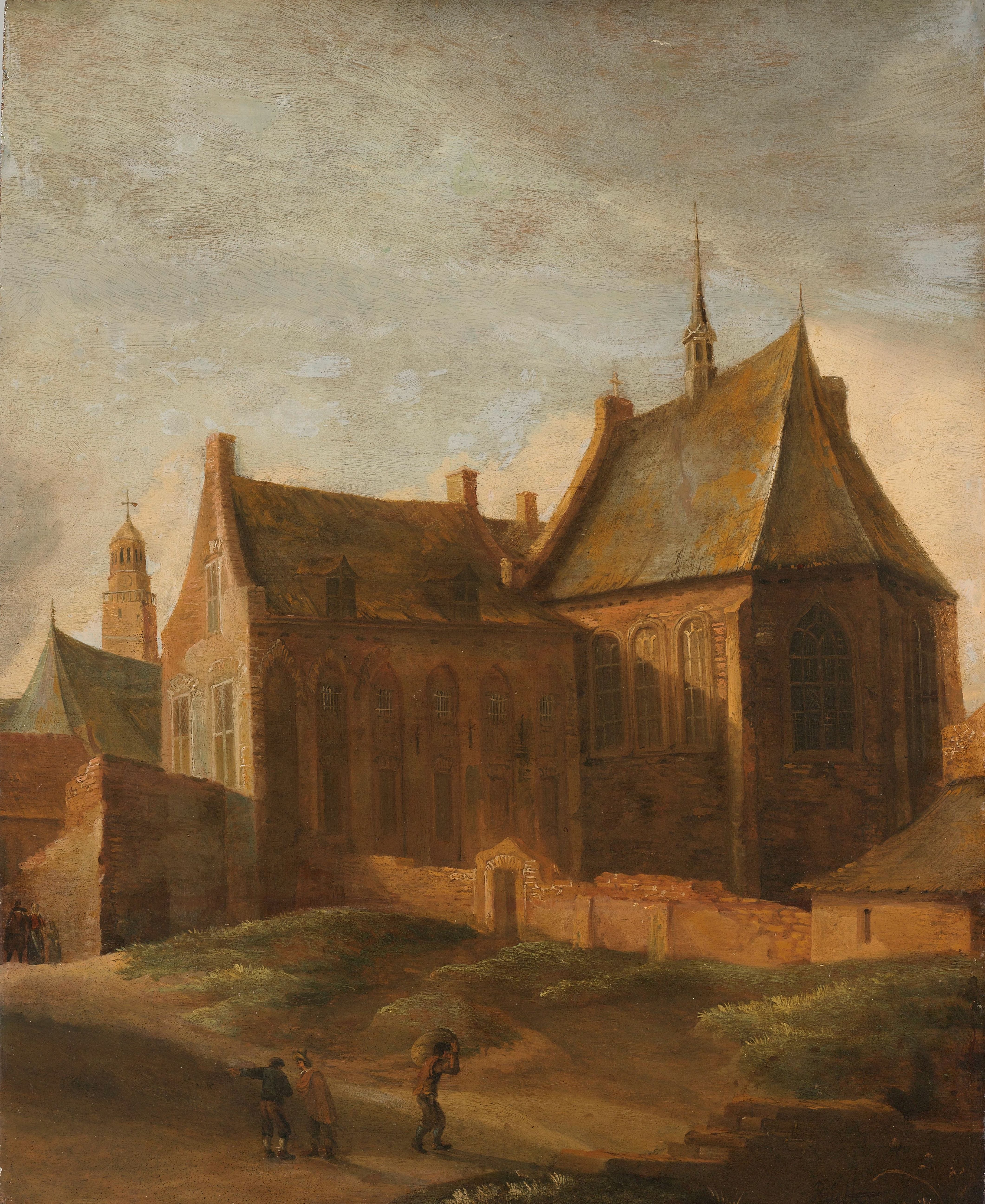 Gezicht op het Agnietenklooster te Utrecht, van buiten de muren. Op de voorgrond enkele figuurtjes.